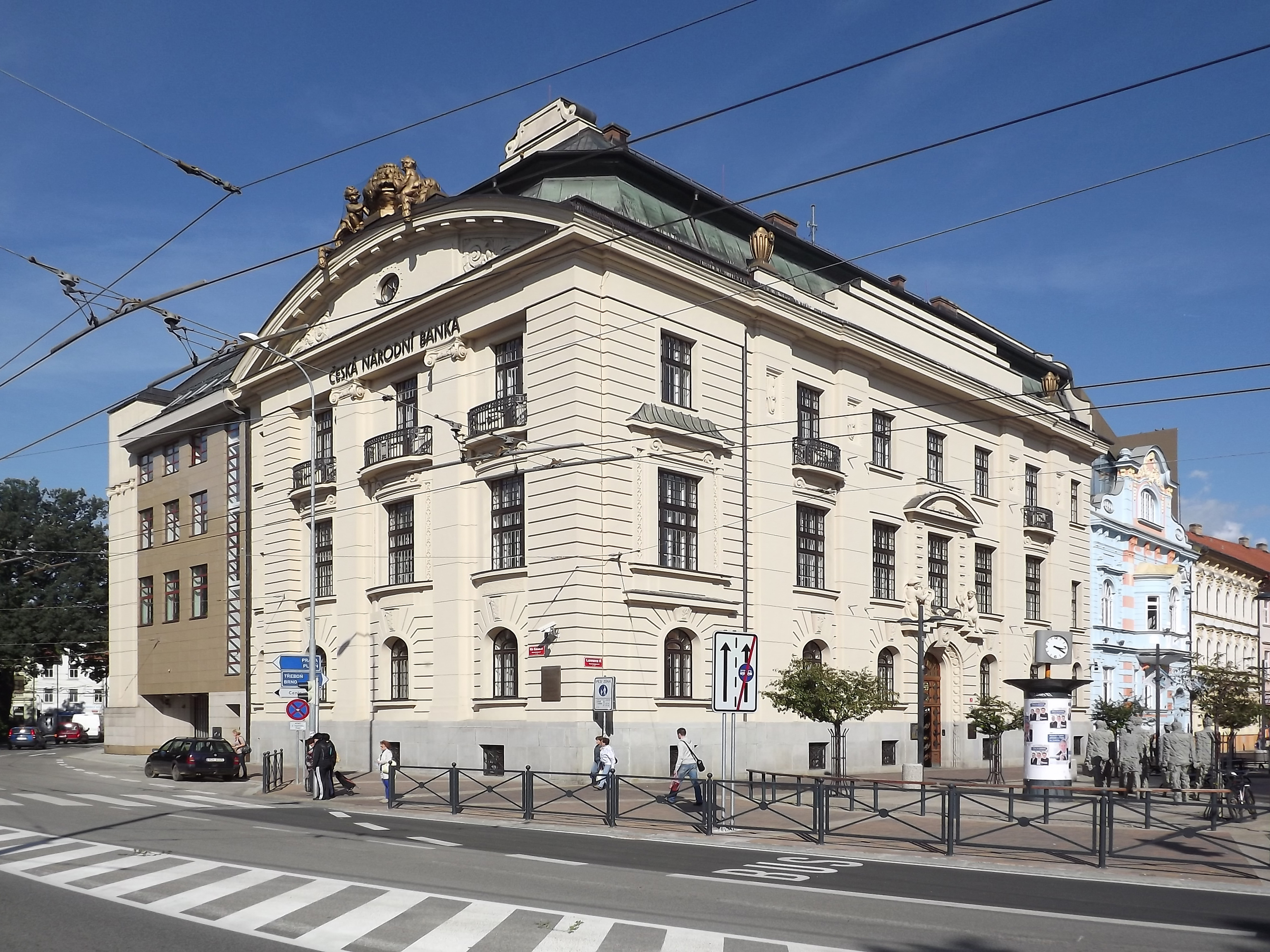 Česká národní banka, Lannova třída 1/1, České Budějovice